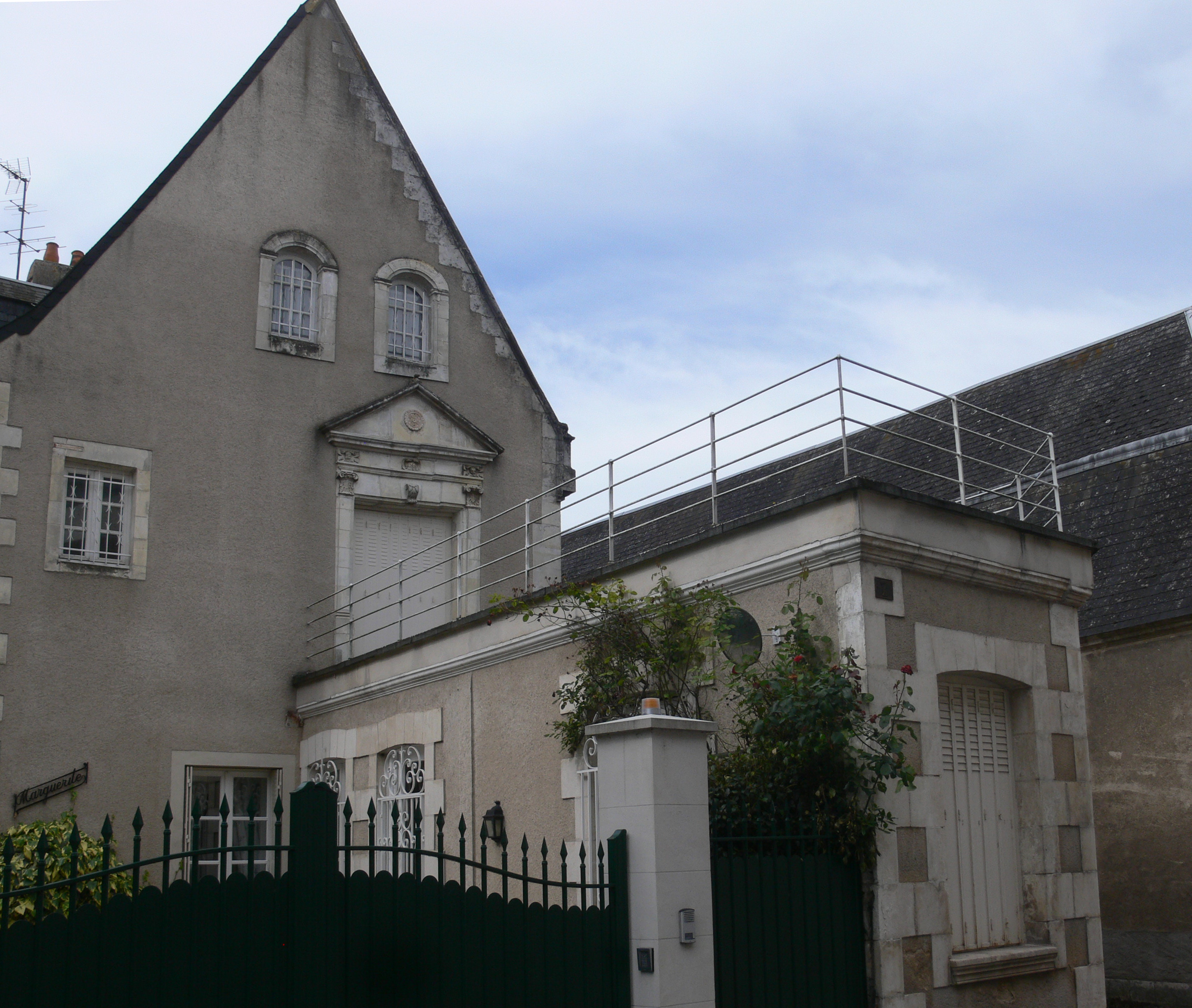 Maison ancienne (Issoudun - 7 rue Pierre Semard)